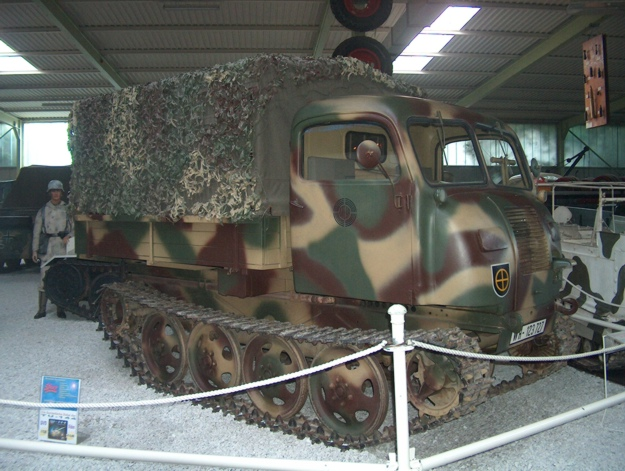 Raupenschlepper Ost - Technikmuseum Sinsheim Fotograf: Christoph Grimlowski (Benutzer Grimmi59_rade - eigenes Foto) Datum: Oktober 2004 00:05, 17. Nov 2004 Grimmi59 rade 625 x 471 (163.017 Byte) (Raupenschlepper Ost - Technikmuseum Sinsheim)